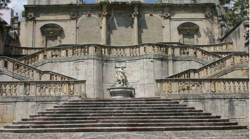 Church Messina Chiesa Nostra Donna della Pietà